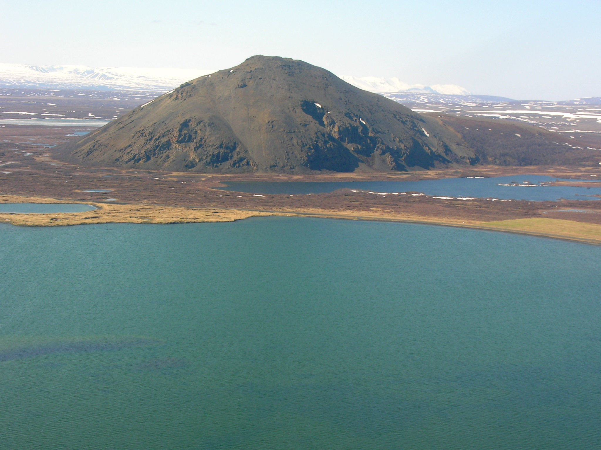 Iceland, Vindbelgjarfjall